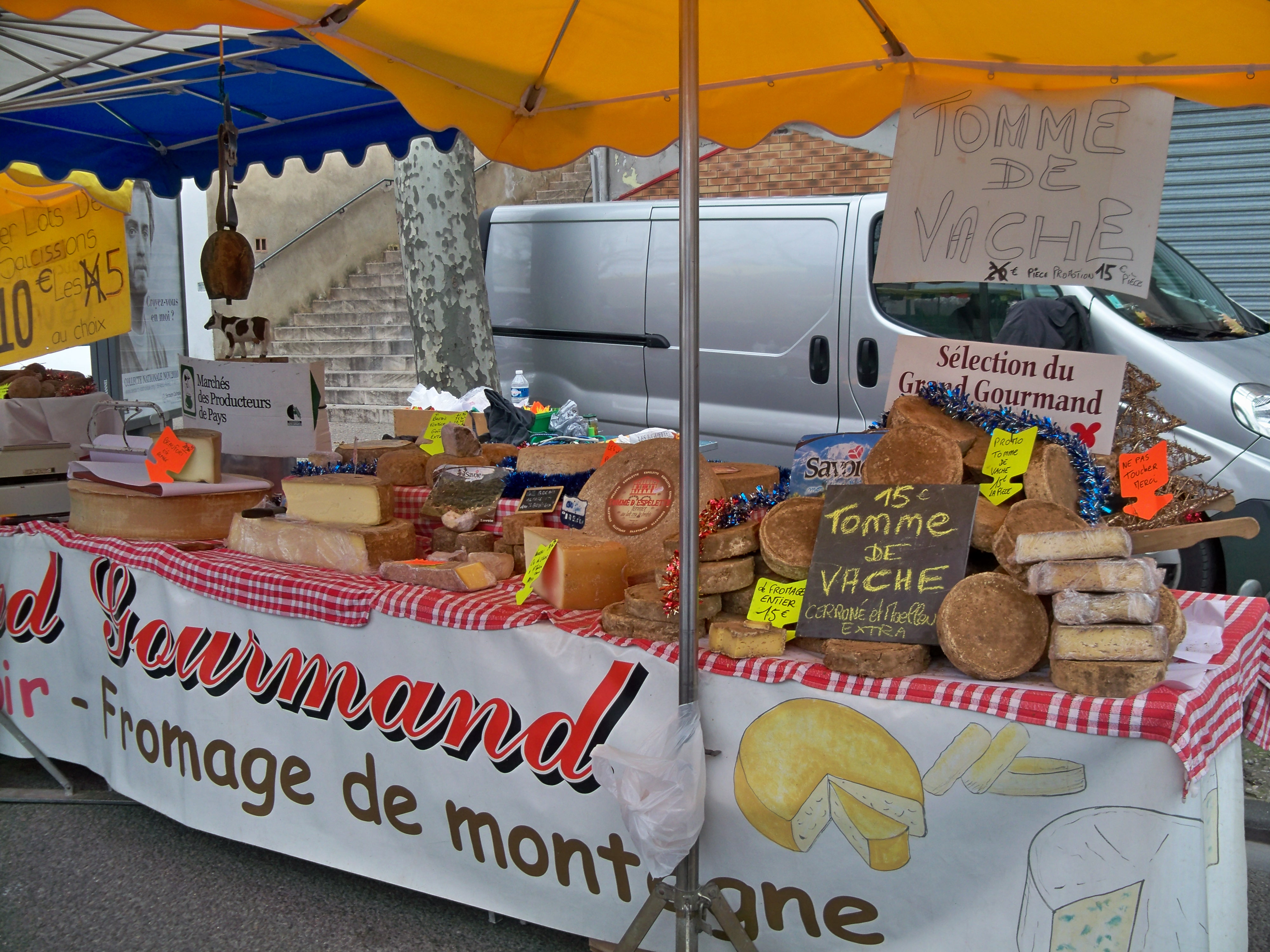 Étale d'un commerçant revendeur de fromages à la Foire de Saint Siffrein de Carpentras, Vaucluse